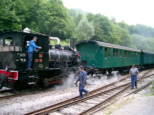 Dampzuch am Fond-de-Gras